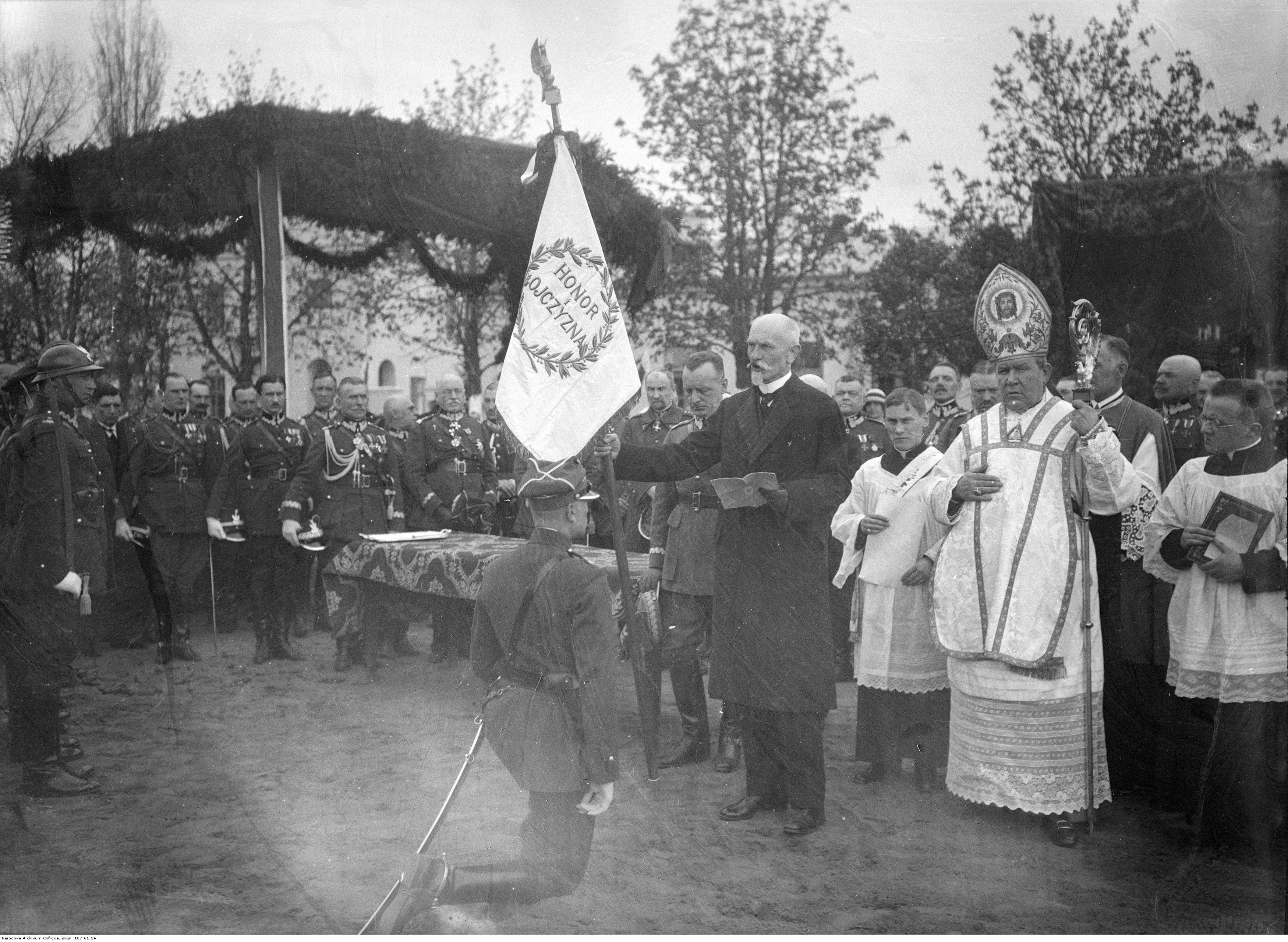 Prezydent RP Stanisław Wojciechowski wręcza chorągiew majorowi Adamowi Radomyskiemu.